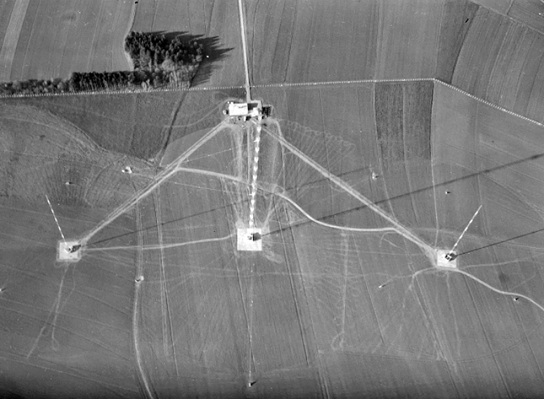 Luftbild der Senderanlage Rot-Weiß-Rot in Kronstorf